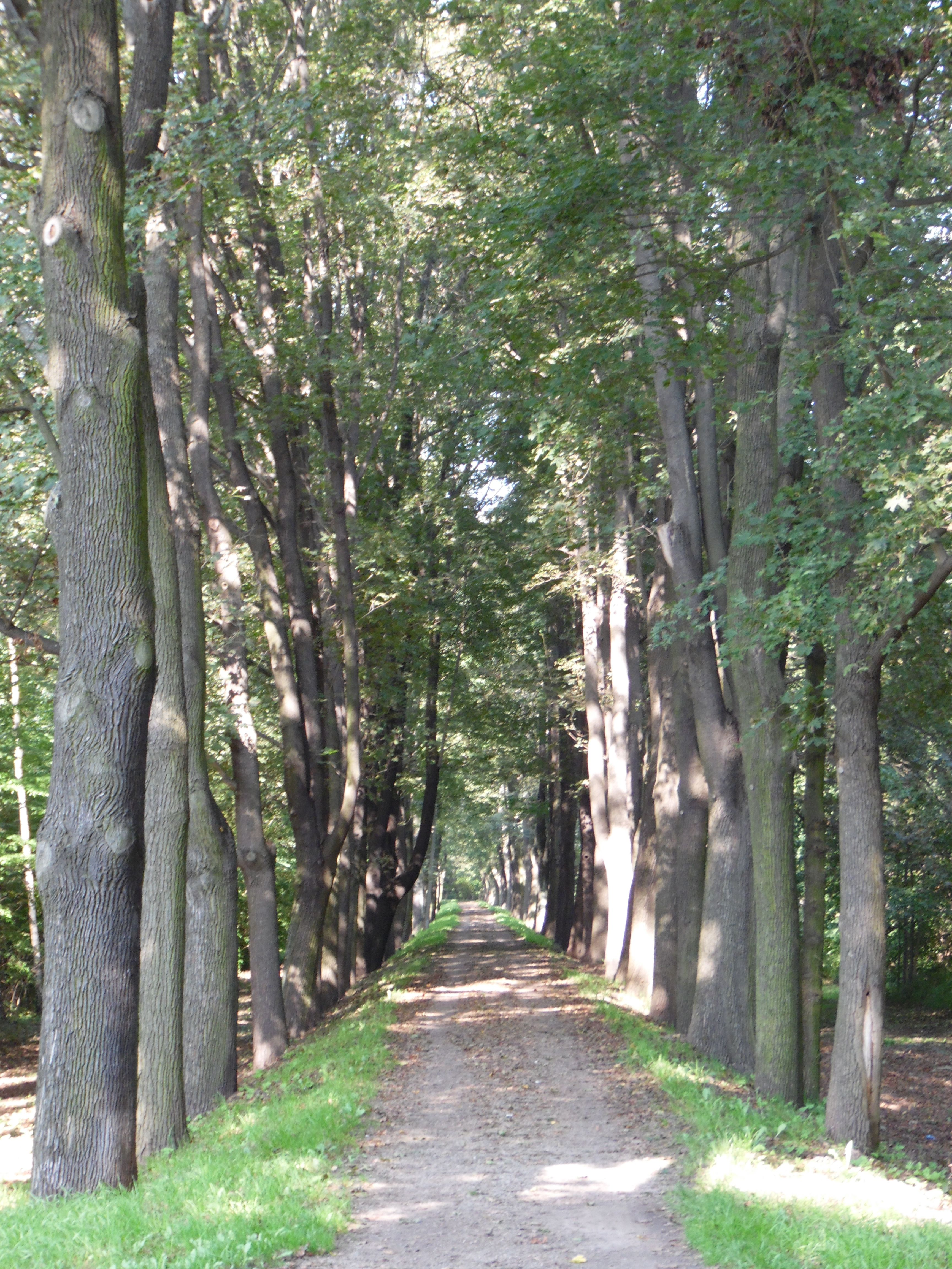 Spitzahorn-Allee Spreedamm, Naturdenkmal, Cottbus (ND 68)